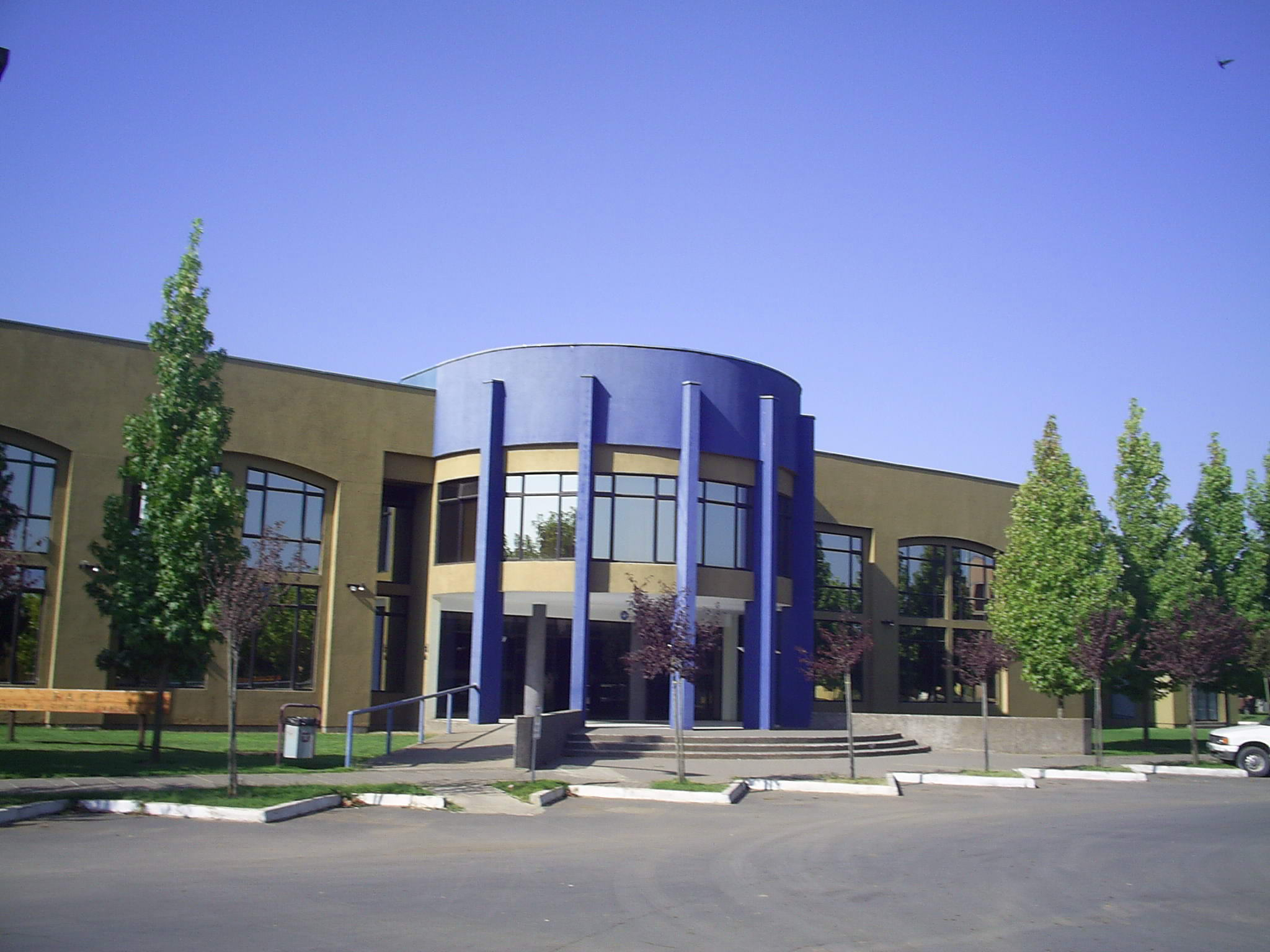 Facultad de Ciencias Empresariales de la Universidad de Talca.